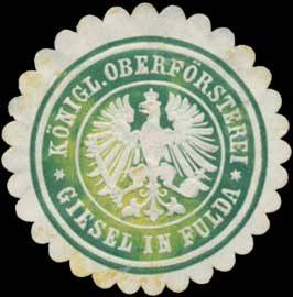 Sealing stamp Title: K. Oberförsterei Giesel in Fulda Description: grün, weiß, geprägt Place: Fulda size: 3 cm